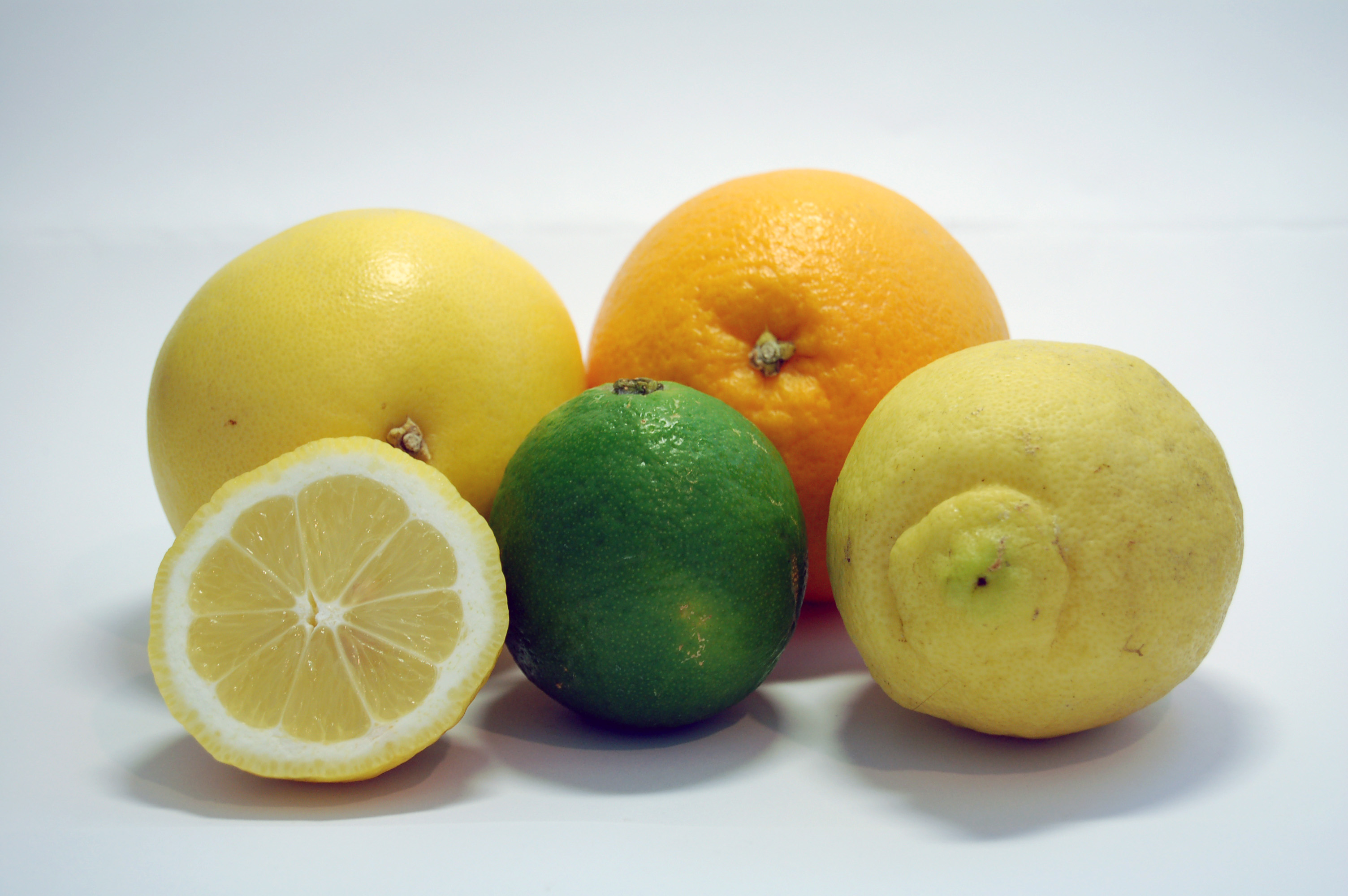 Hesperidia